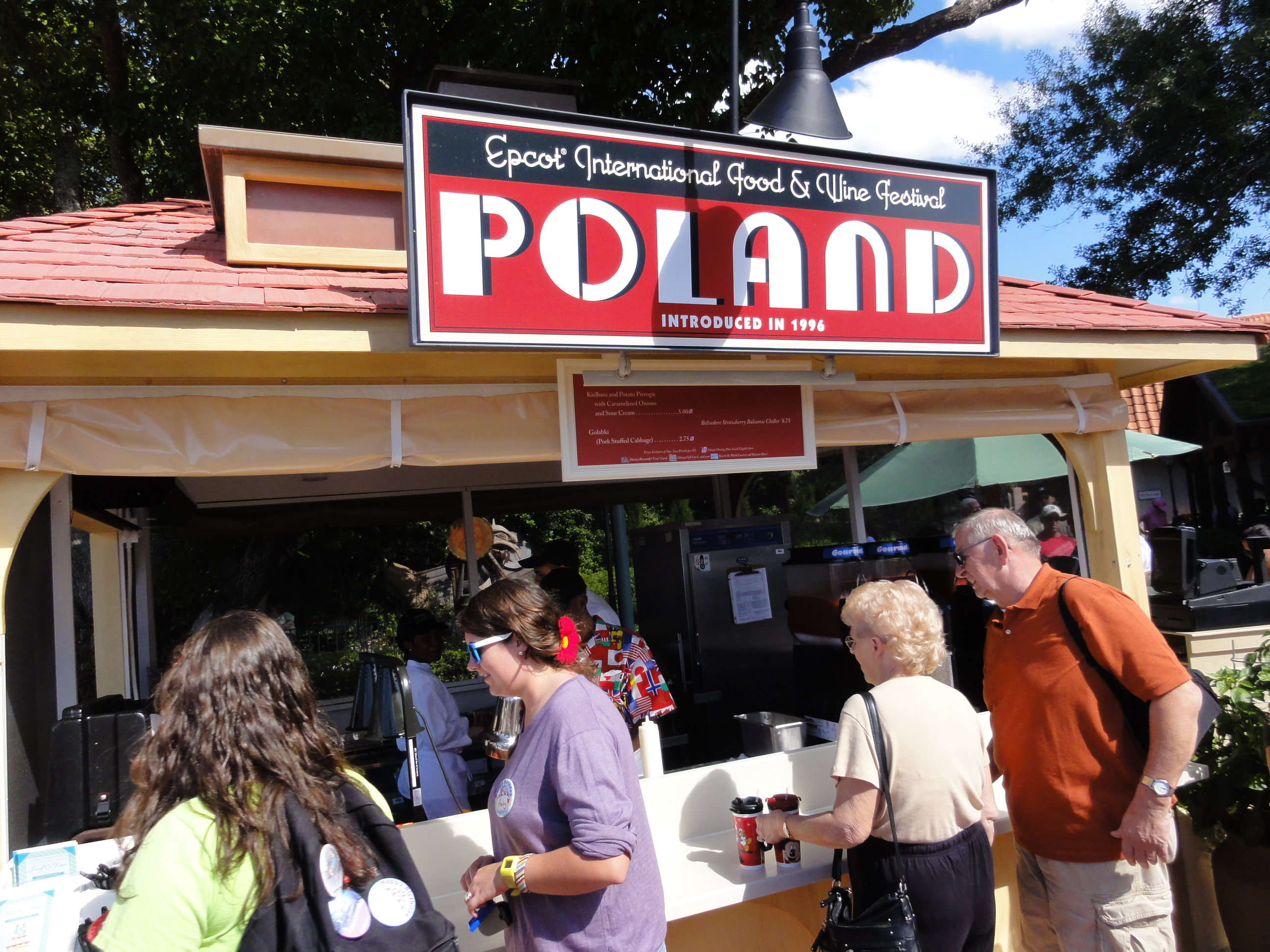 Le stand de la Pologne à Foire internationale de Floride